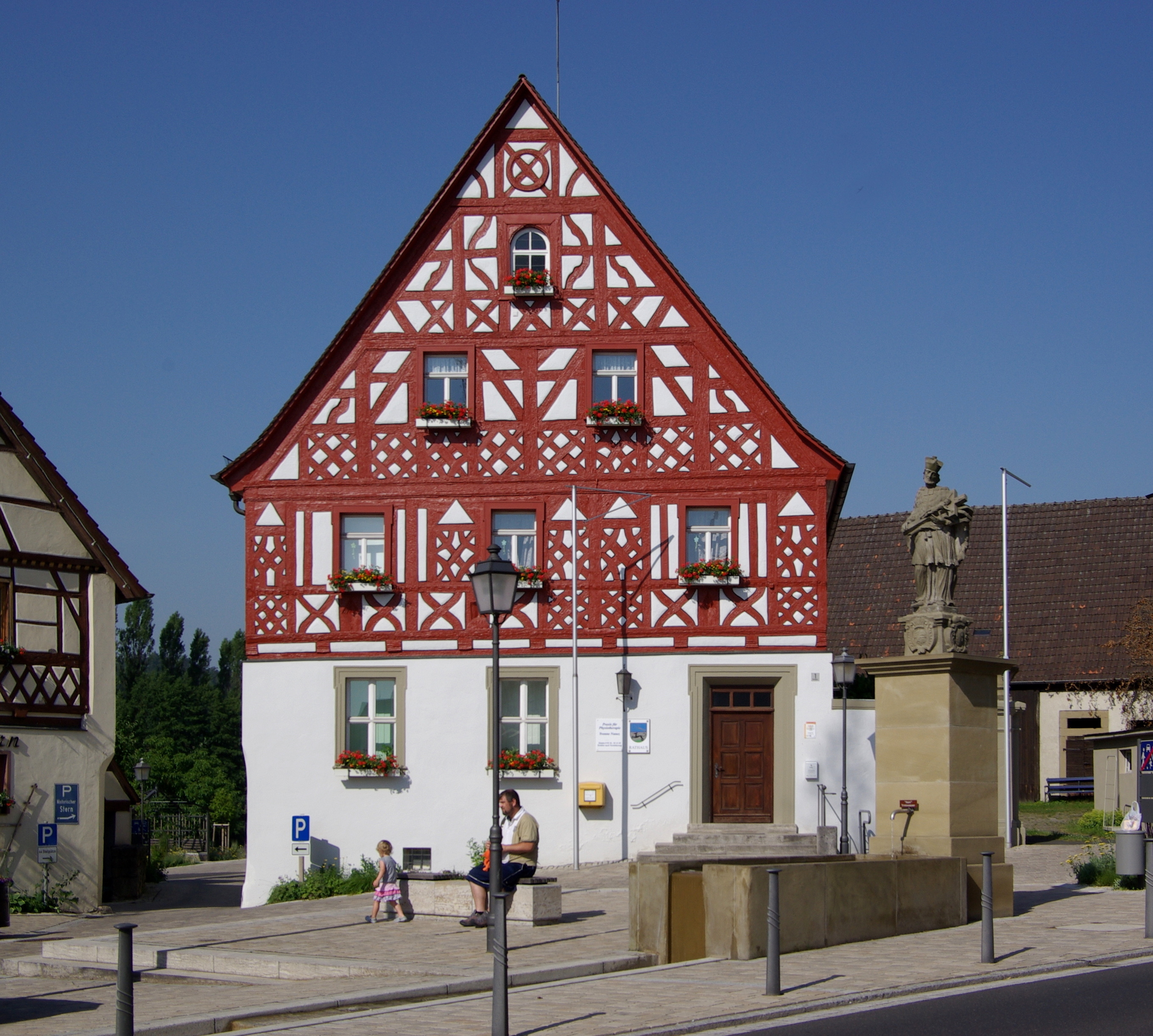 Geiselwind, Marktplatz 1, Rathaus und Marktbrunnen mit Figur des hl. Nepomuk